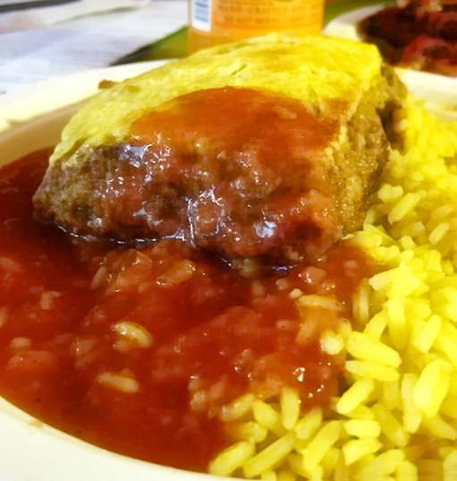 Bobotie auf Safranreis und mit Chutney